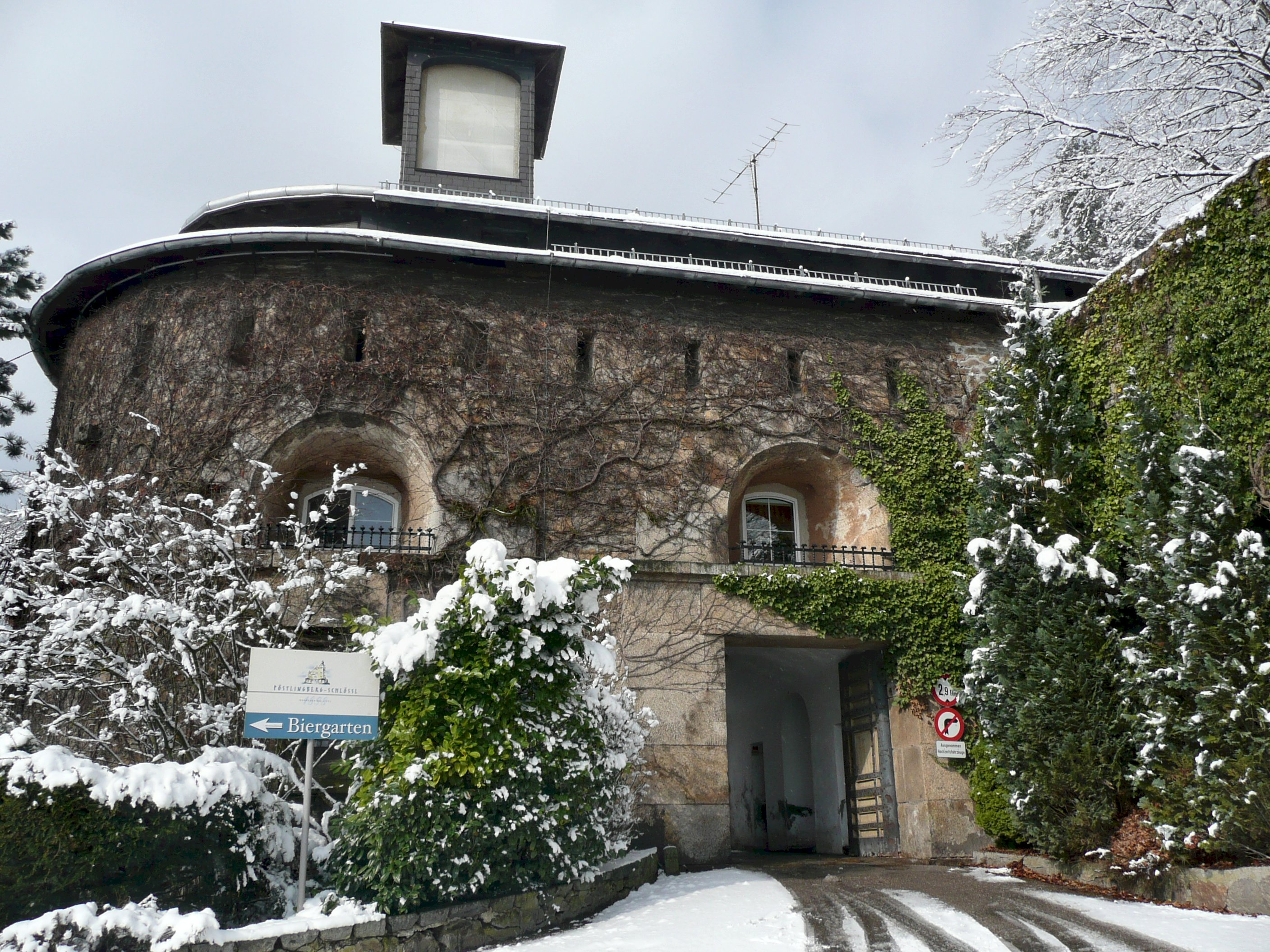 Turm VI (Nothburga) - Eingangstor